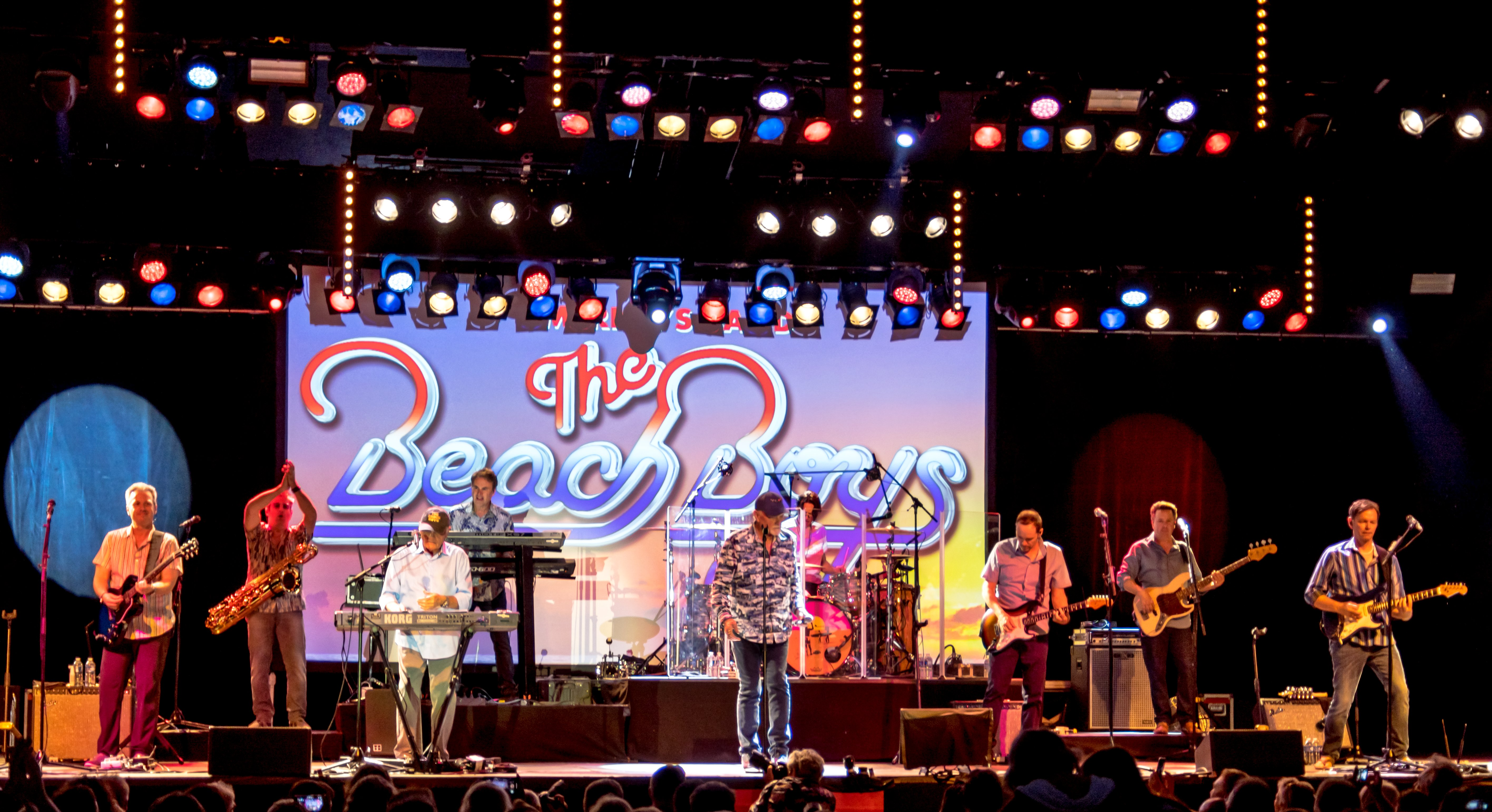 Bilder vom Zelt Musik Festival 2019 in Freiburg im Breisgau